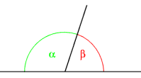 Ángulos adyacentes Dibujo original de Larocka